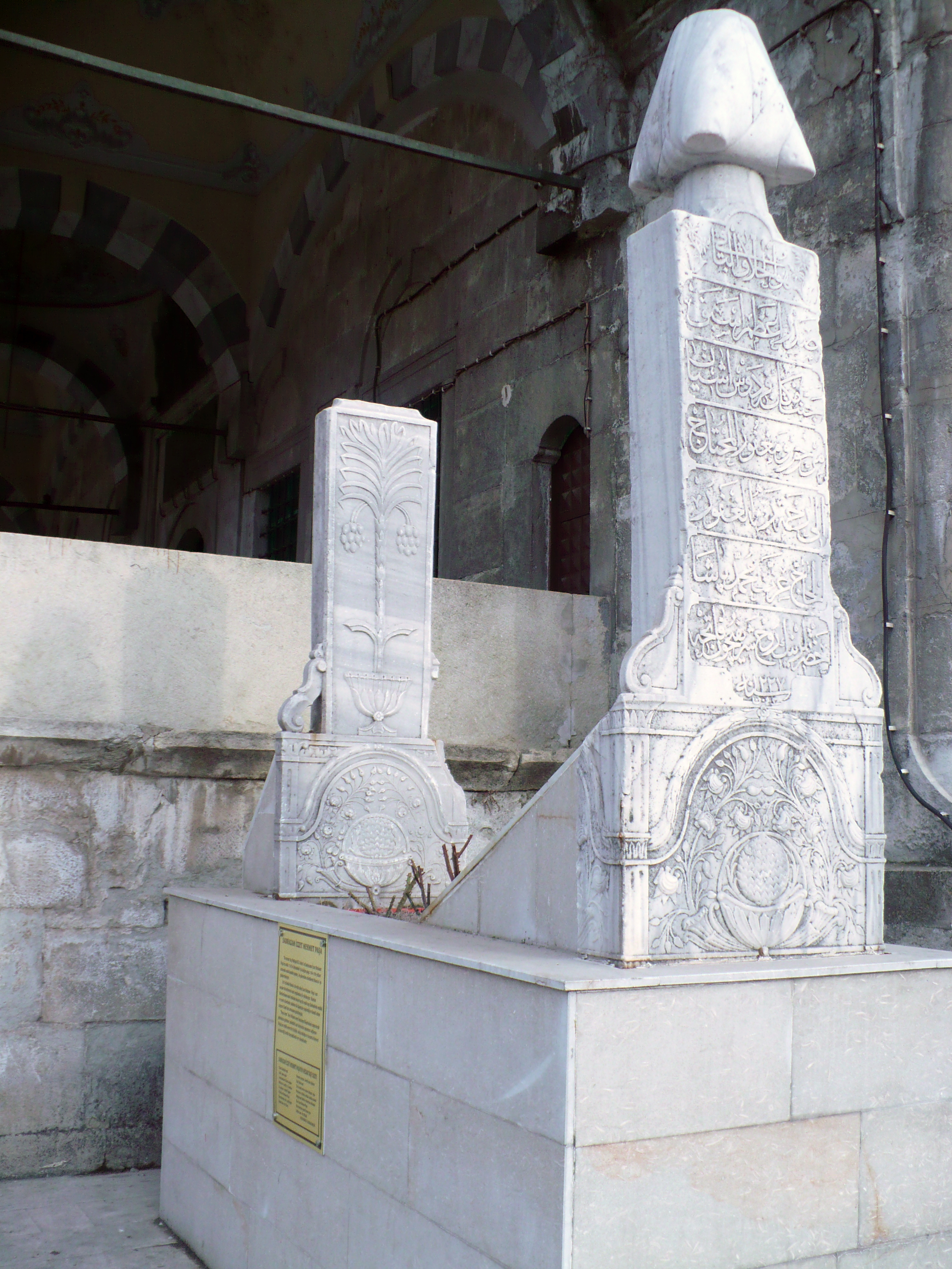 Sadrazam İzzet Mehmet Paşa'nın kabri. Safranbolu/Karabük